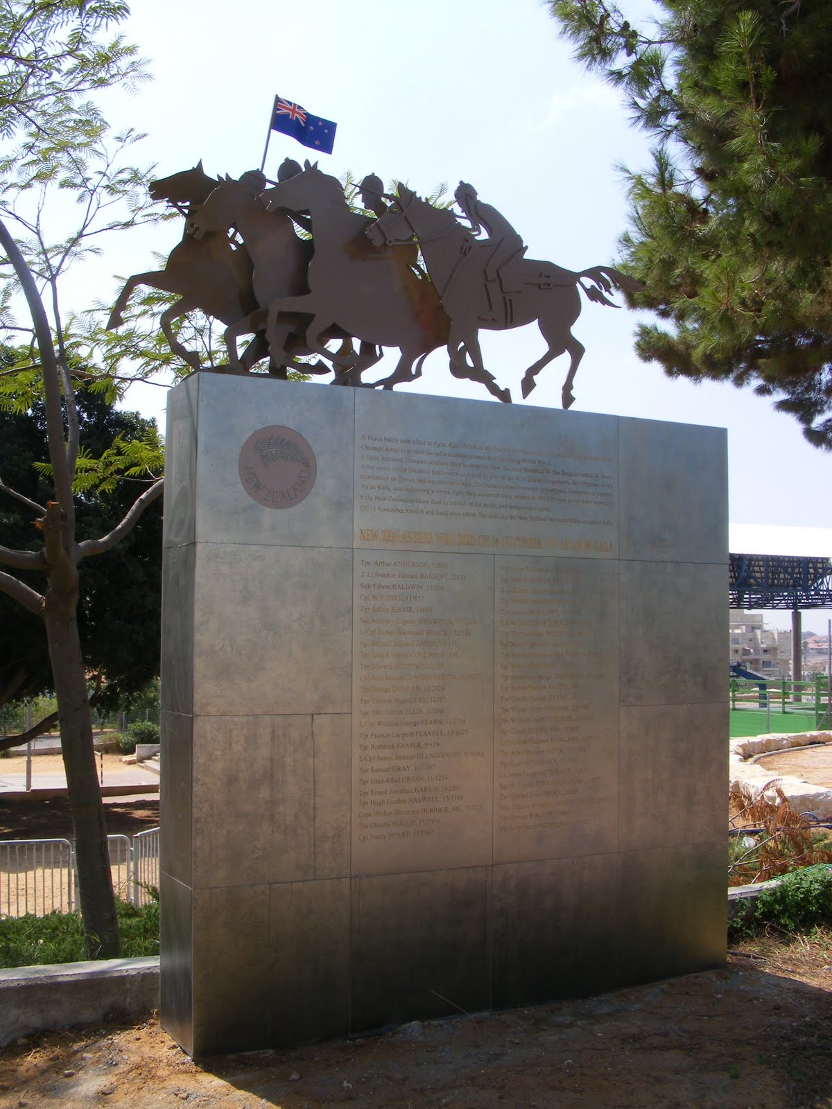 אנדרטאה לזכר קרב עיון קרא